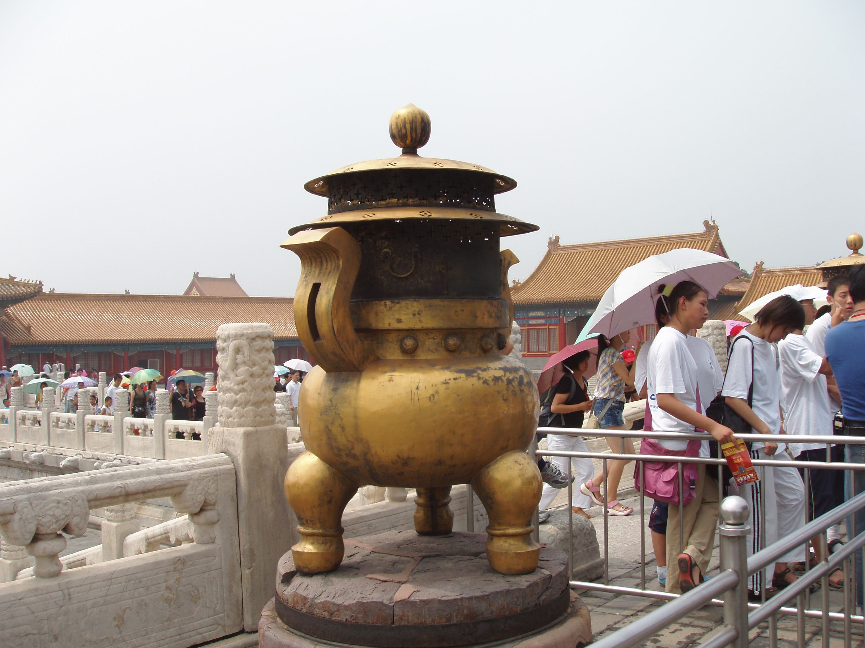 紫禁城內一爐。